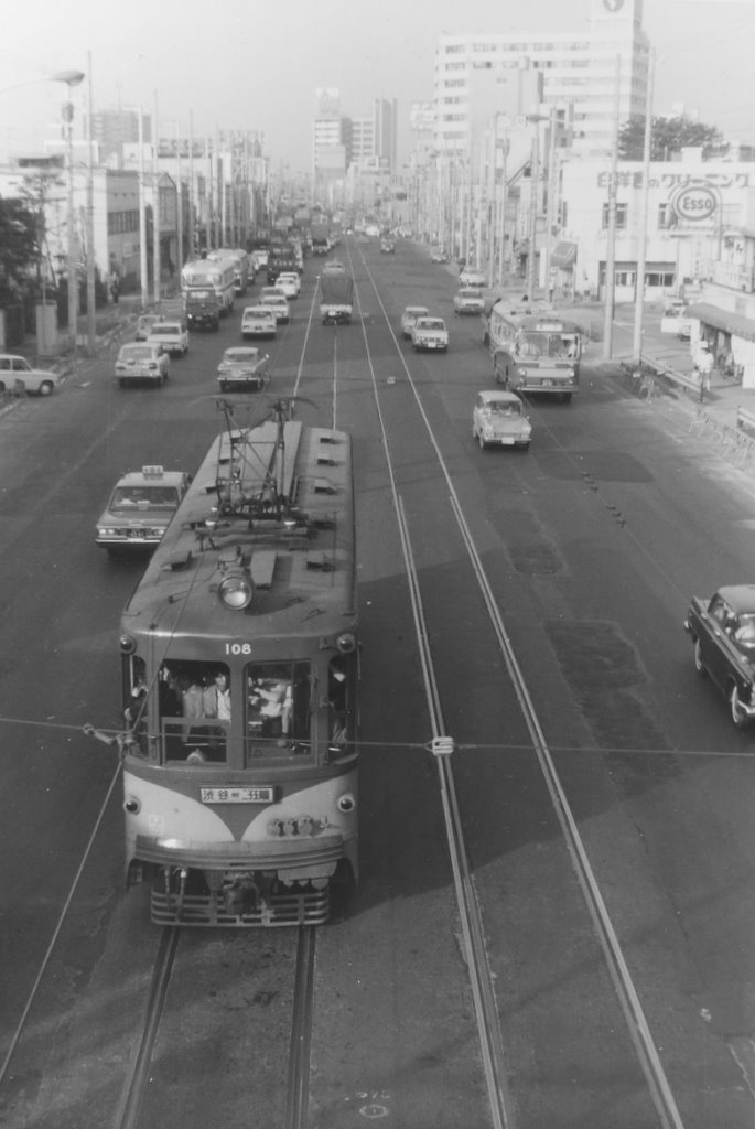 東急玉川線 真中駅 - 駒沢駅